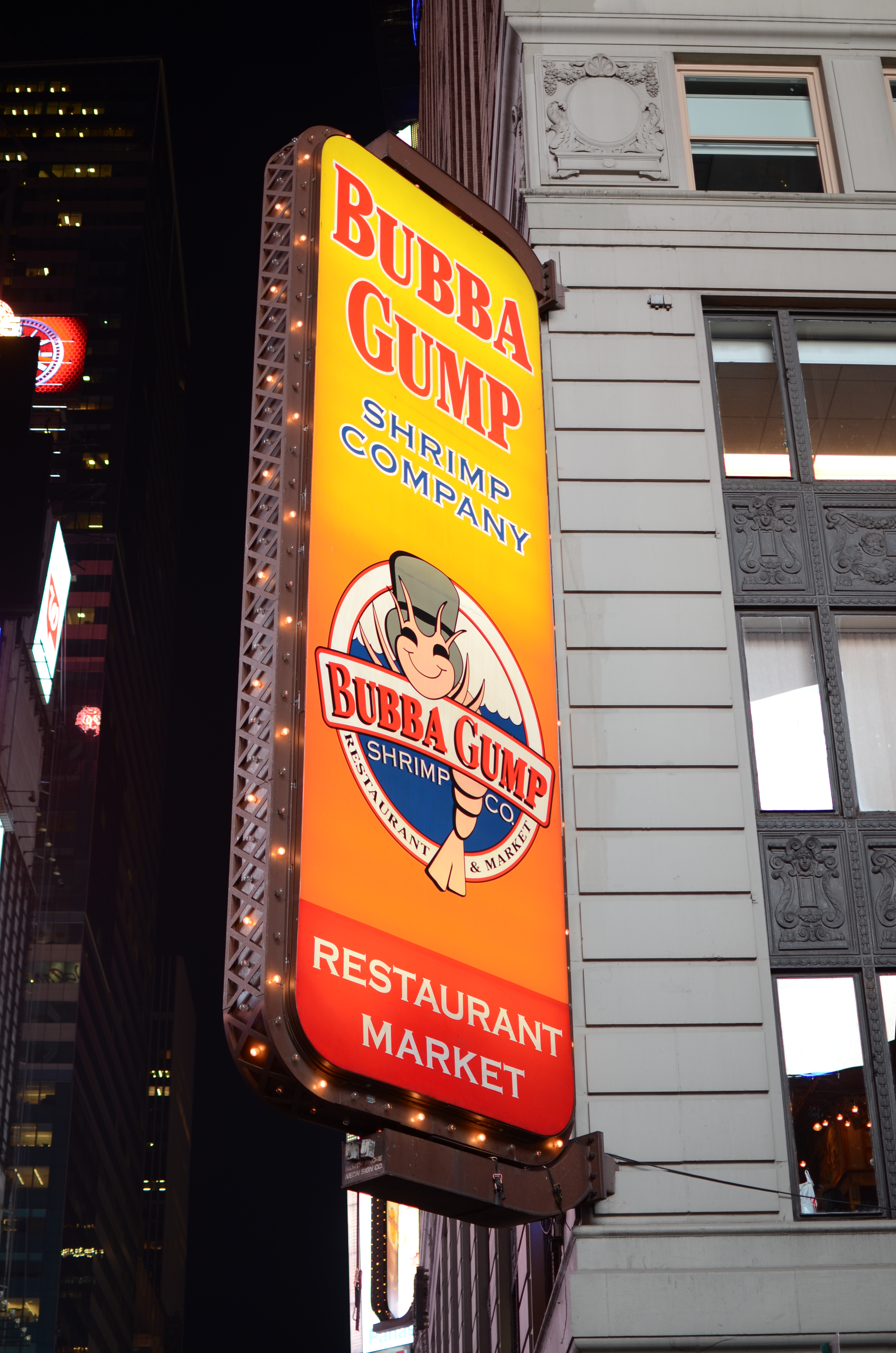 Een vestiging van Bubba Gump Shrimp Company op Times Square, New York.